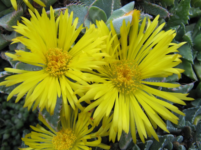 Faucaria